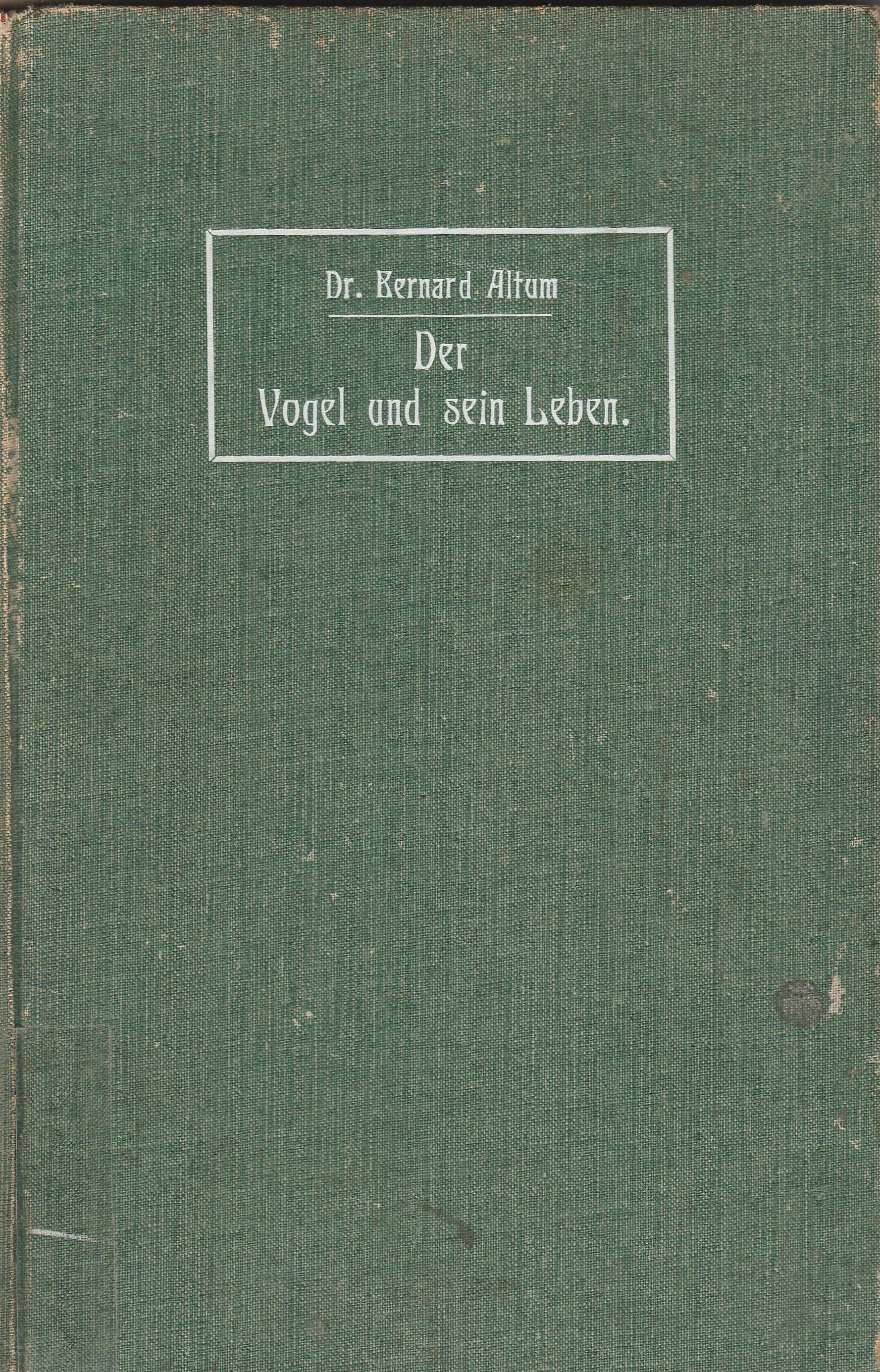 Cover of the book Der Vogel und sein Leben by Bernard Altum. Eighth edition (Achte Auflage). Heinrich Schöningh, Münster in Westfalen 1906.